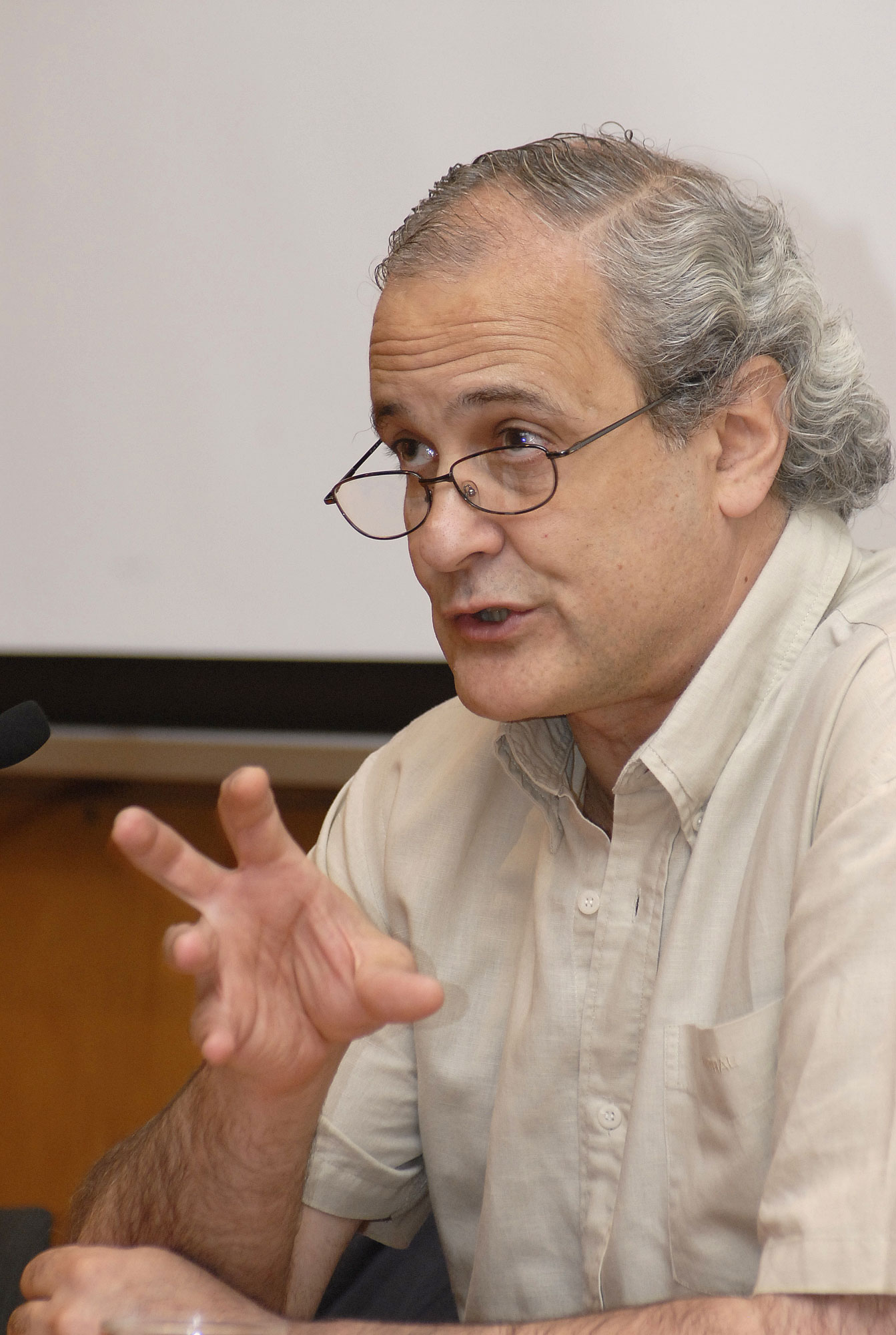 The architect and historian visiting the Faculty of Arts at the Catholic University of Chile in 2009 / El arquitecto e historiador Adrián Gorelik visitó la Facultad de Letras UC. Este crítico de la cultura urbana se caracteriza por ver a la urbe no como un mero territorio, sino como el lugar en donde es posible la vida social y la cultura; además examina aspectos poco estudiados, tales como la relación de la ciudad con el contexto histórico que la produjo.